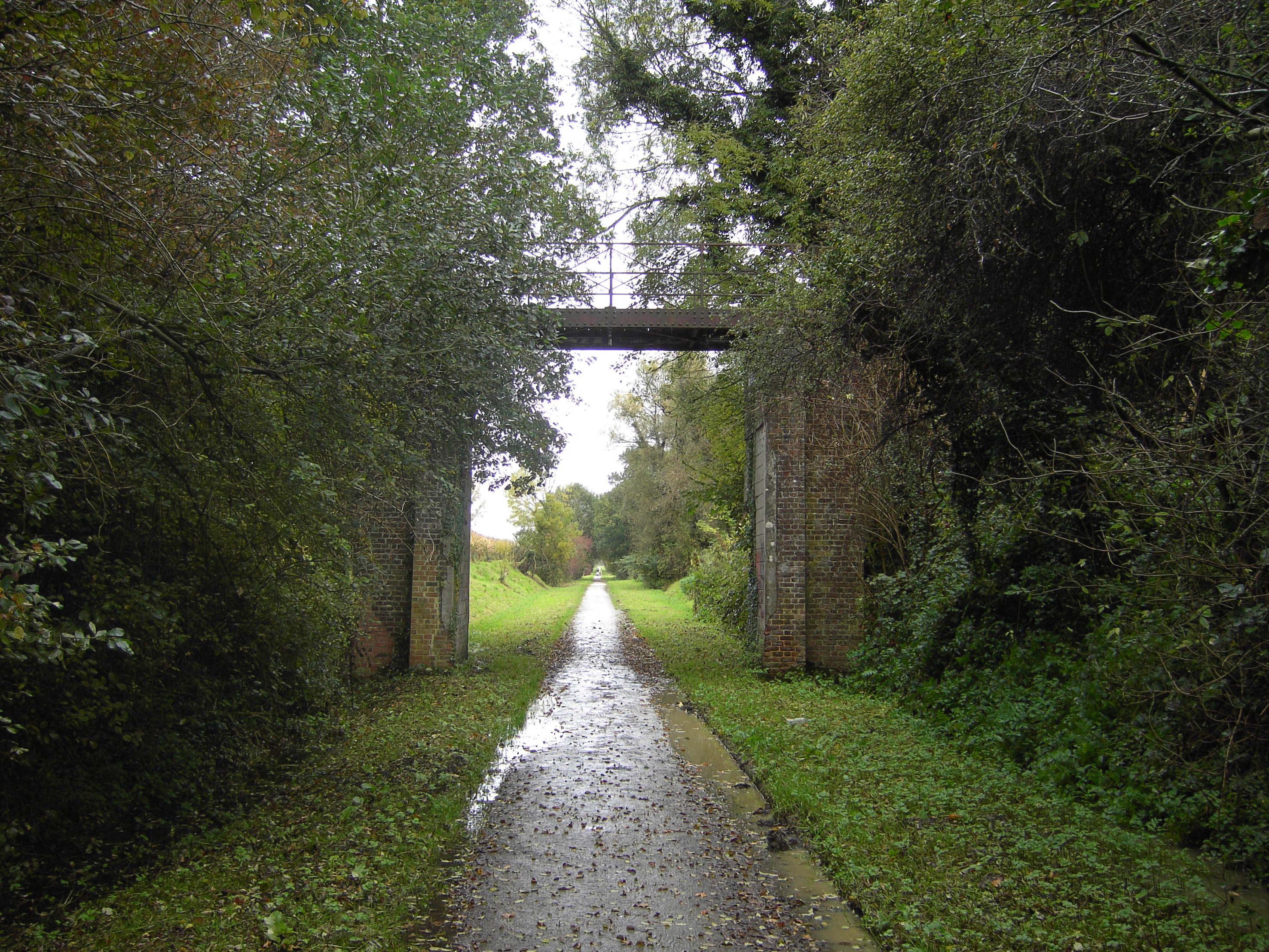 Mijnwerkerspad tussen Brakel en Zottegem ter hoogte van Rozenbeke.